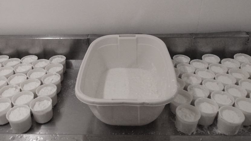 Photo de fromages moulé à la louche dans une fromagerie artisanale.